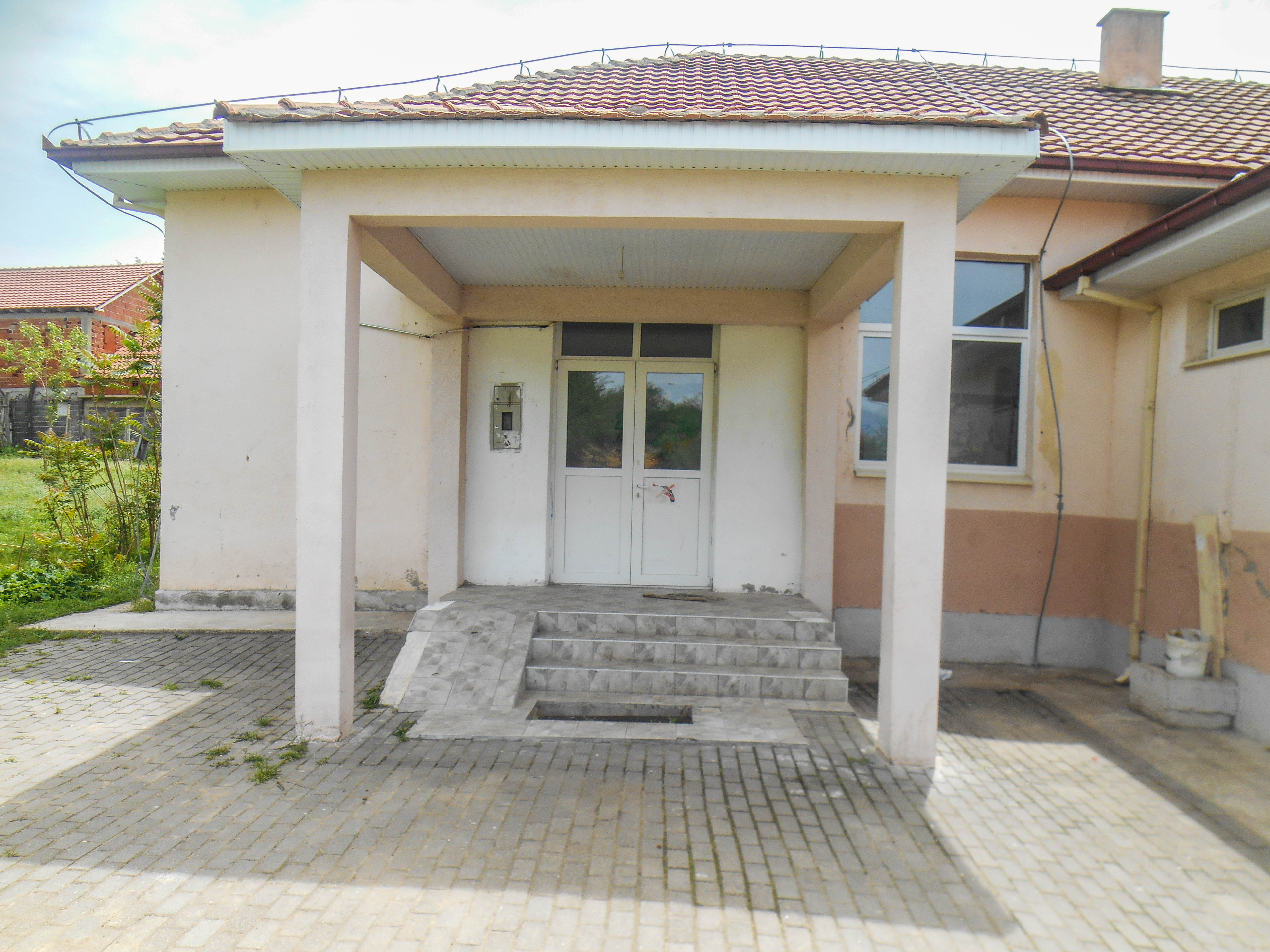 Основно училиште „Гоце Делчев“ - Сушево